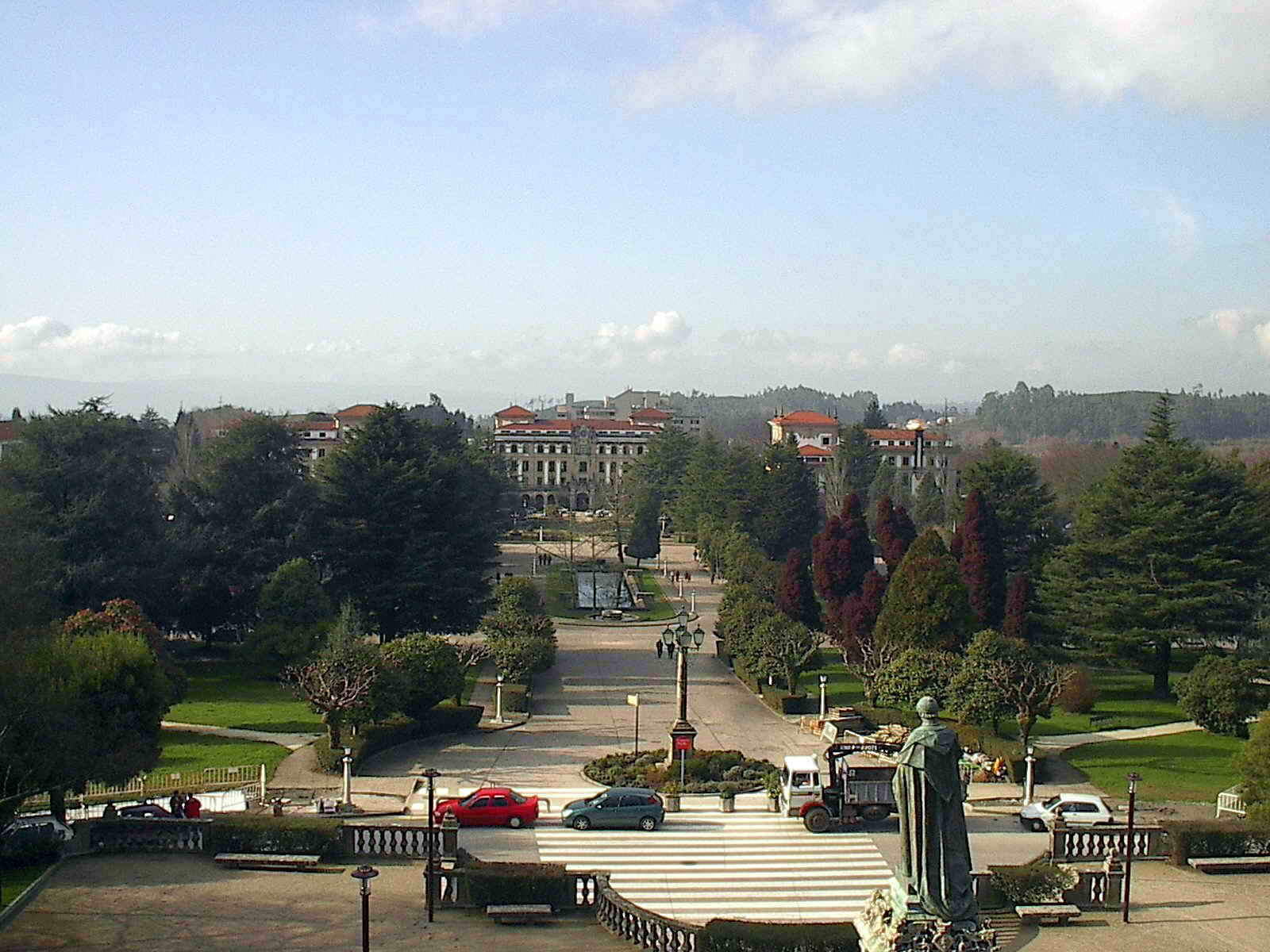 Santiago de Compostela - Galicia - España (Spain)